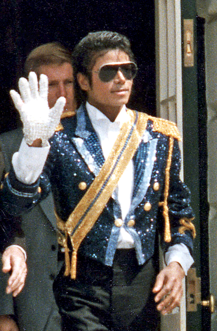 Michael Jackson